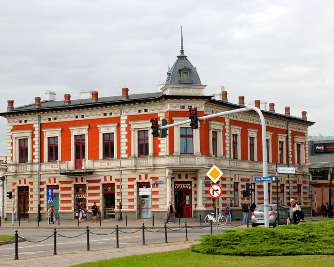 kamienica, tzw. pałacyk Müshama, 1894 Włocławek, ul. Kościuszki 2, miasto Włocławek